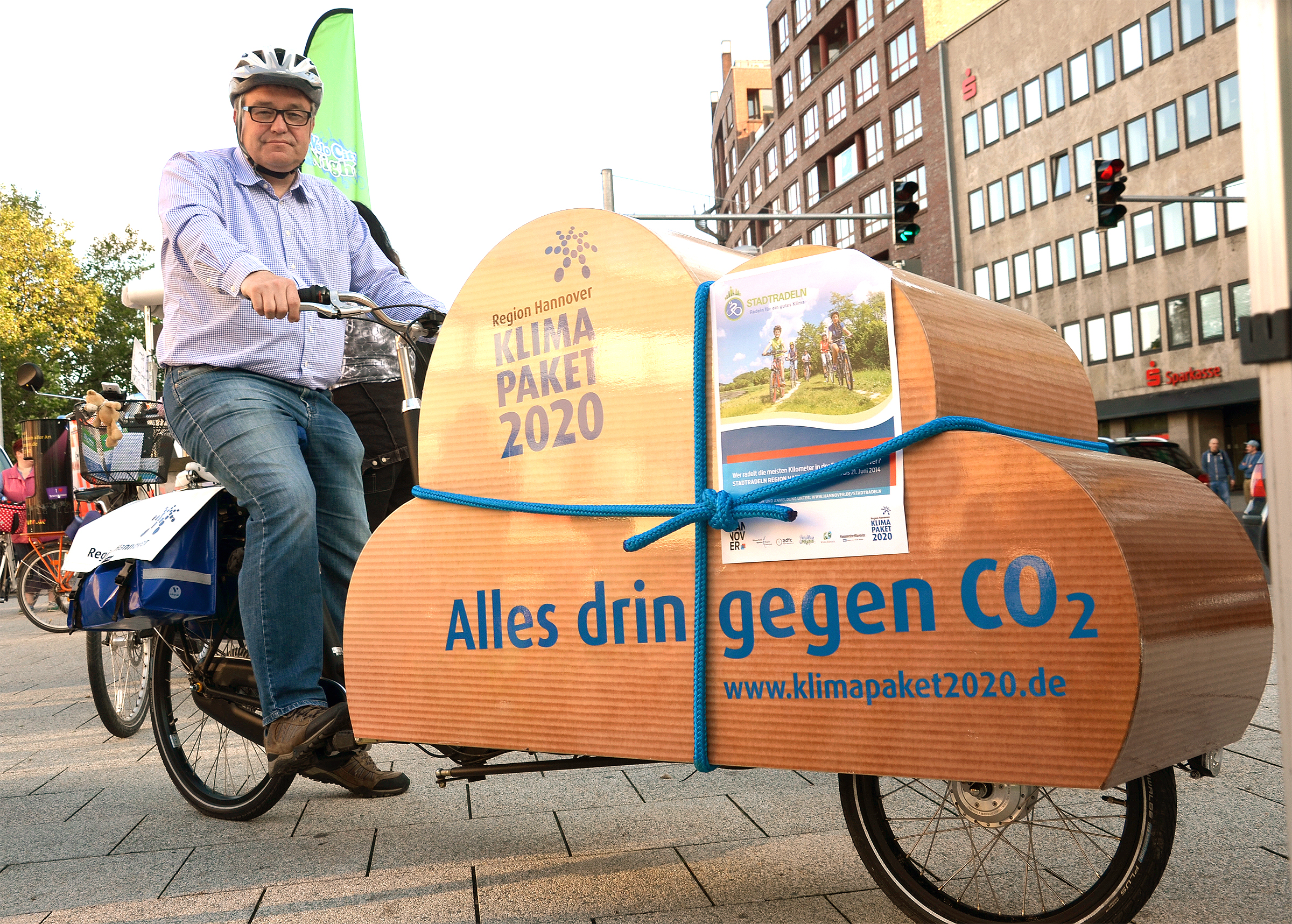 Bei der Velo City Night am 23. Mai 2014 vom Platz an der Goseriede in Hannover zur Rathausplatz in Hemmingen startete Regionspräsident Hauke Jagau mit Fahrradhelm auf einem umgebauten Fahrrad: Eine mit blauem Seil umspannte Wolke warb für das Klimapaket 2020 der Region Hannover mit dem Spruch "Alles drin gegen CO2". Ein aufgeklebtes Plakat machte auf das am Autofreien Sonntag am 1. Juni 2014 beginnende Auftaktveranstaltung für den bundesweiten Wettbewerb Stadtradeln aufmerksam ... Der im Zuge der innerstädtischen Umbaumaßnahmen Hannover City 2020 + neu gestaltete Platz an der Goseriede in Hannover wurde